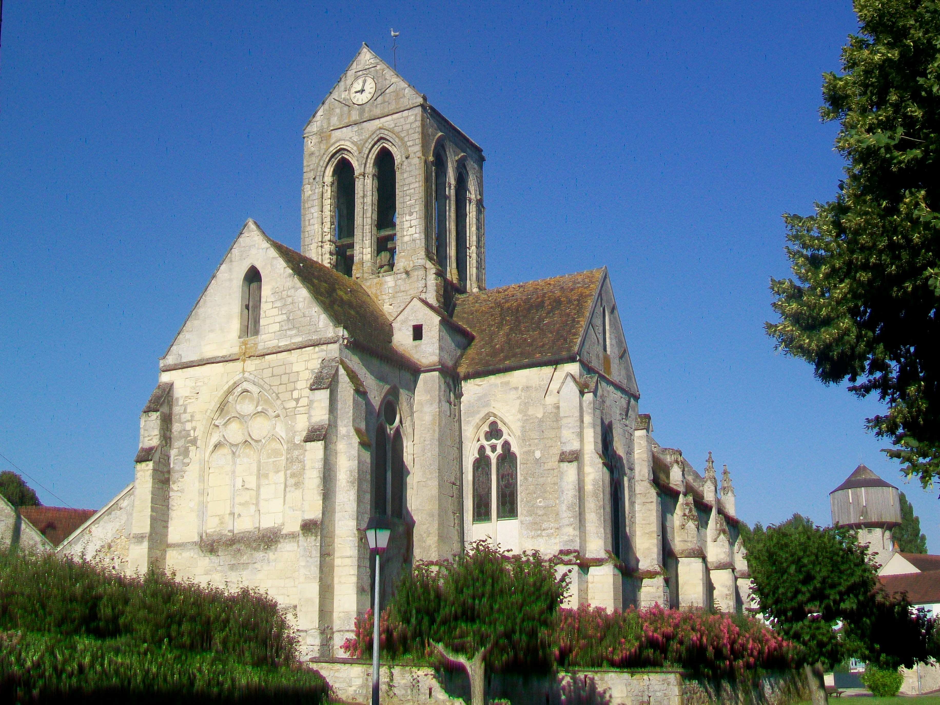 Chevet et clocher, depuis l'est.